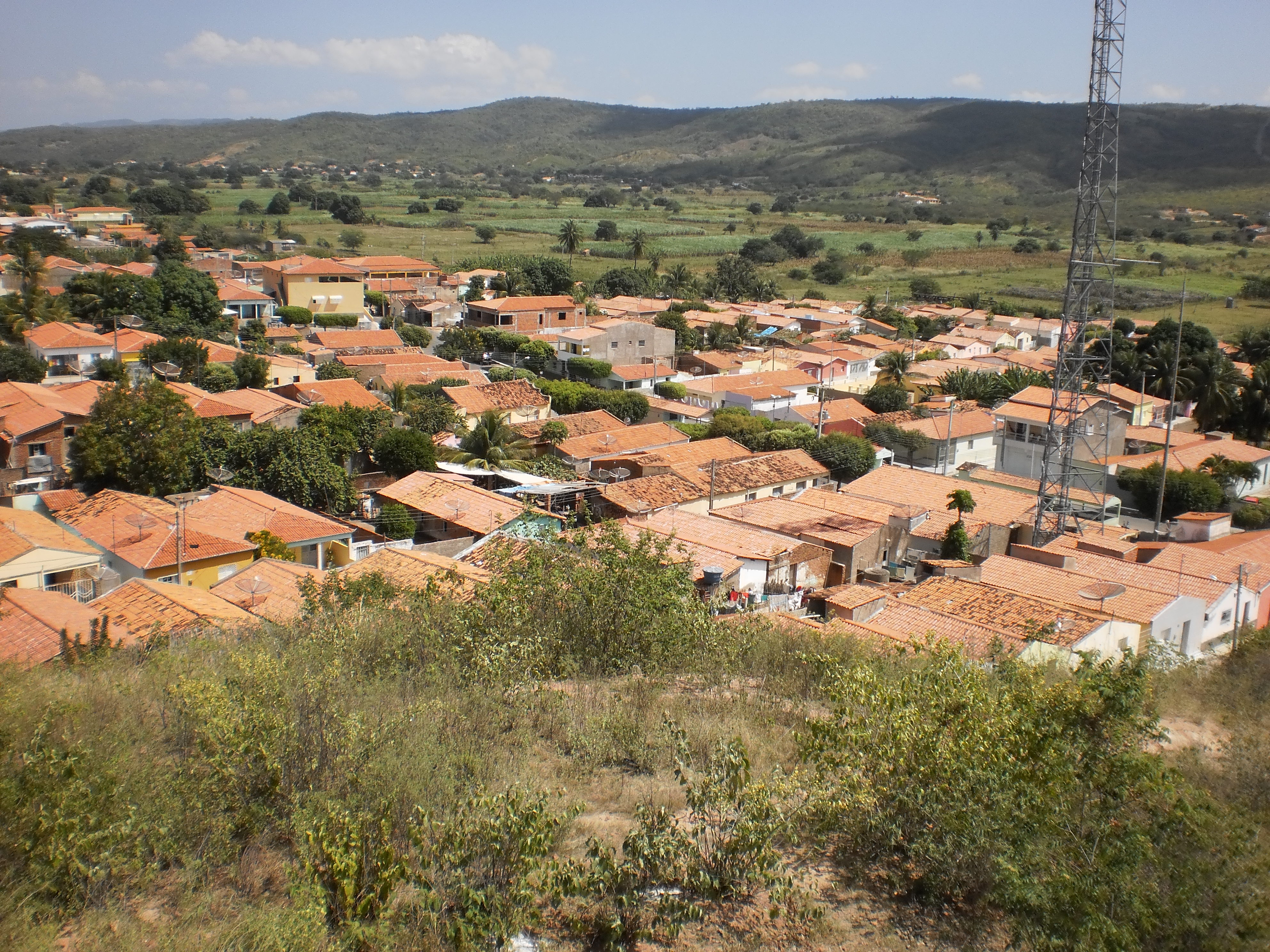 Vista parcial panorâmica da cidade de Coronel João Pessoa (Rio Grande do Norte, Brasil) a partir do Cruzeiro dos Pagãos.